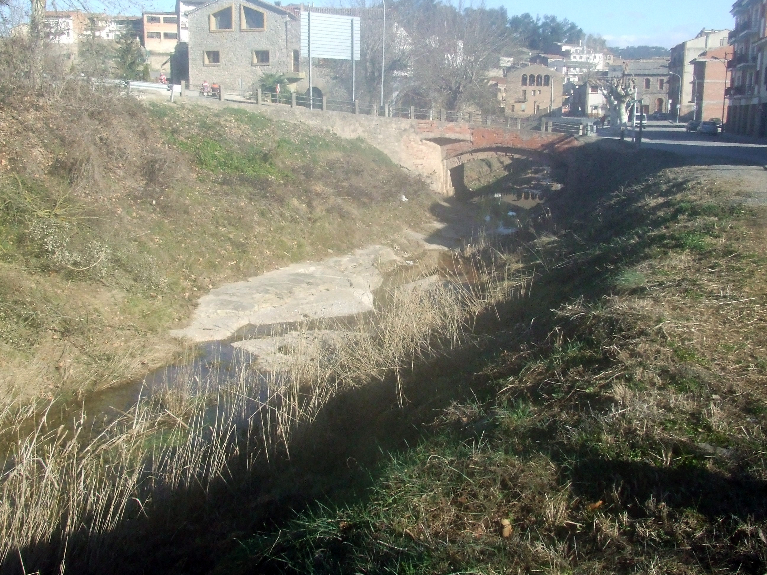 La riera, o torrent, de l'Om (Monistrol de Calders, Moianès)